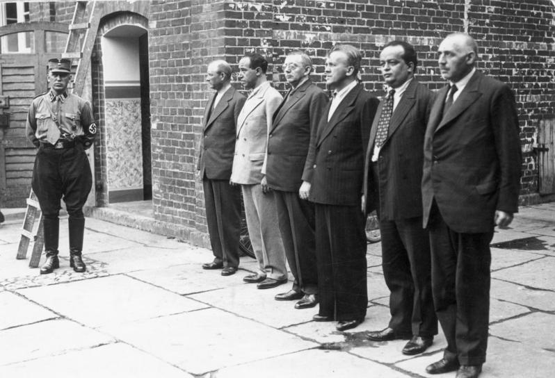 Zentralbild Konzentrationslager Oranienburg (nordwestlich von Berlin). UBz: die Einlieferung von SPD-Mitgliedern und Rundfunkleuten im August 1933; von rechts: Ernst Heilmann (SPD), Friedrich Ebert (SPD und Chefredakteur), Alfred Braun (Rundfunksprecher), Heinrich Giesecke (Min.Rat a.D., Direktor der Reichs-Rundfunk-Gesellschaft), Dr. Hans Flesch (Rundfunkintendant) und Dr. Kurt Magnus (Direktor der Reichs-Rundfunk-Gesellschaft). 27087-33